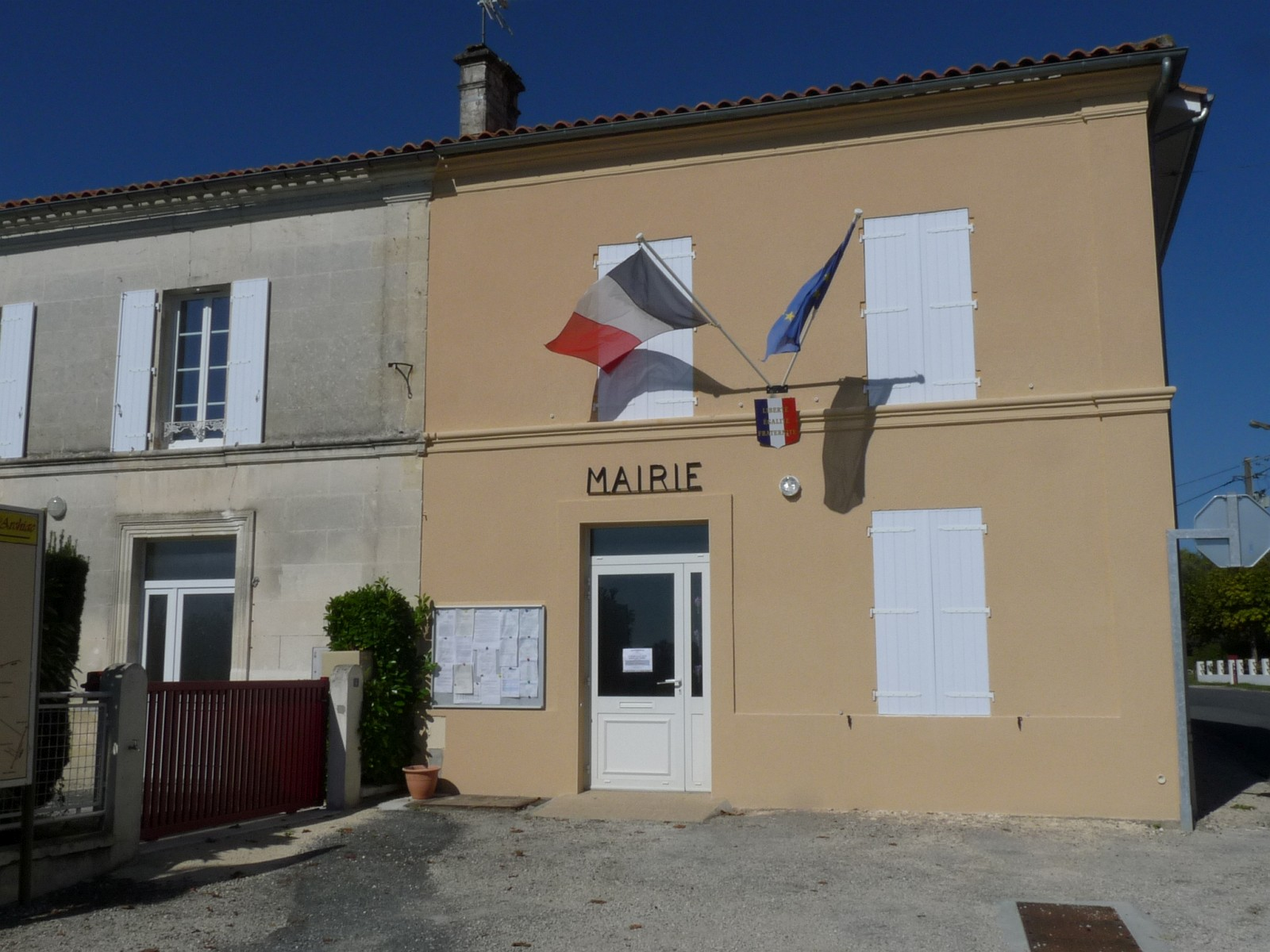 Mairie de Brie-sous-Archiac, Charente-Maritime, France